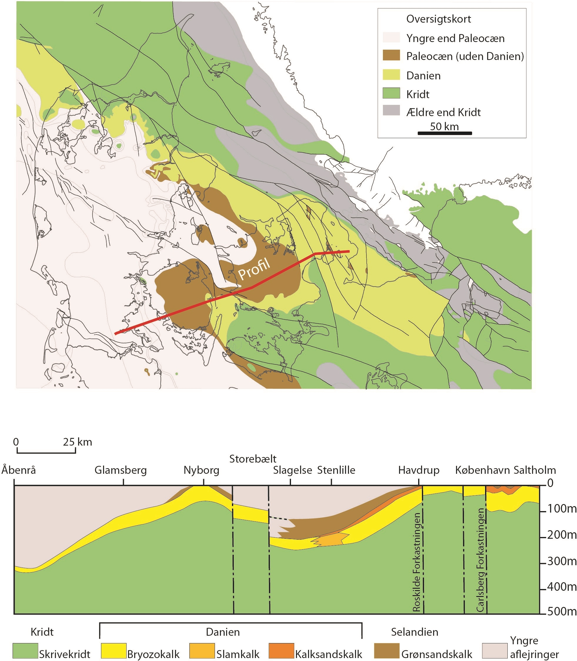 Profil der viser et snit gennem de danske kalkbjergarter (efter Fallesen 1995, Foged et al. 1995, Gravesen 1994, Kelstrup 1995, Klitten 2003, Mielby & Sandersen 2005, Nielsen & Japsen 1991, Pedersen 2001, Stenestad 1976)